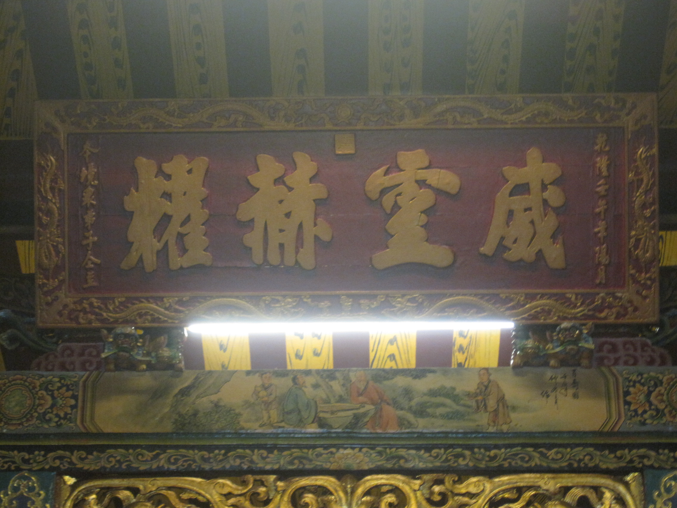 武當山上帝廟威靈赫耀匾